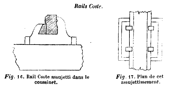 Dessin